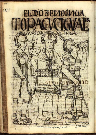 Hp_inka12.jpg